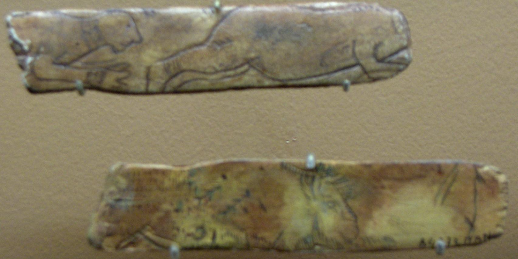 Plaquettes, femmes et bisons, os, paléolithique, musée des antiquités nationales, Saint-Germain-en-Laye